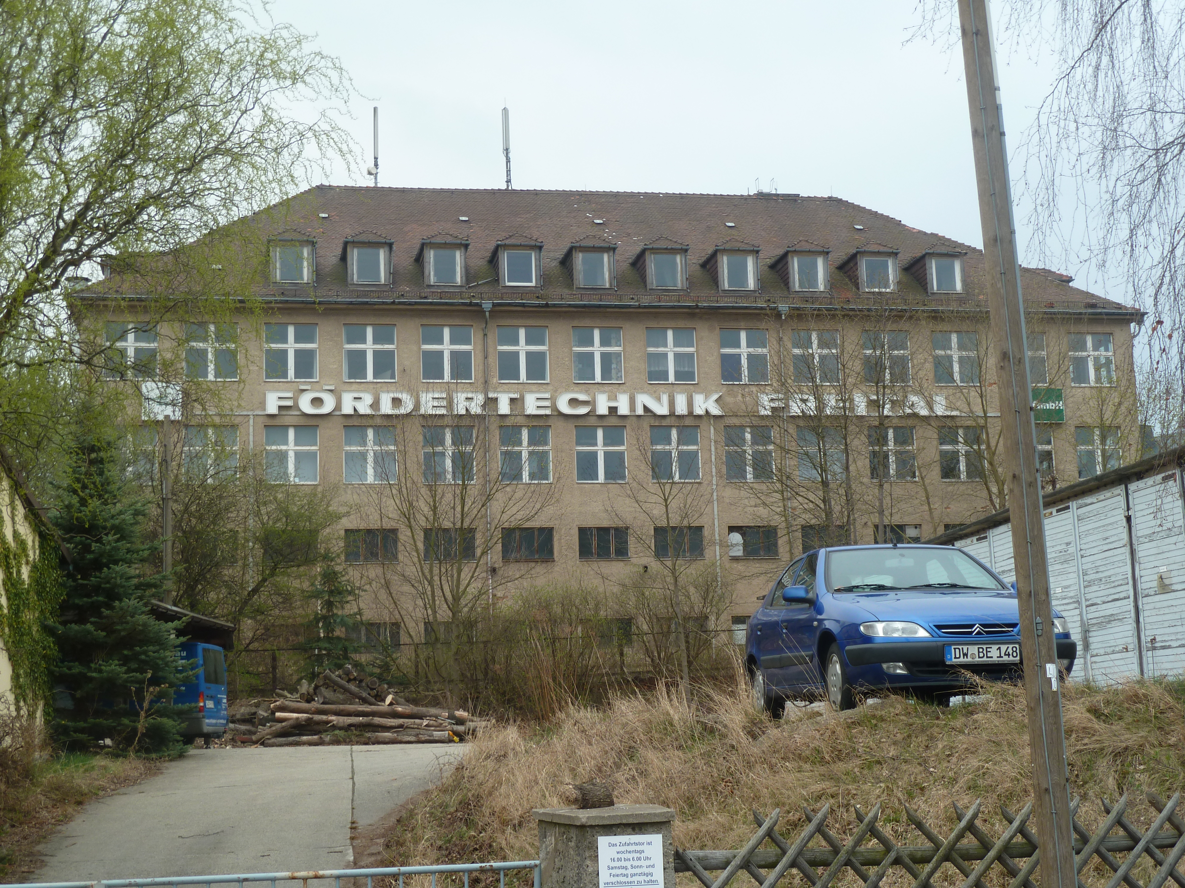 Fabrikhalle, früher Maschinenfabrik Gebrüder Bühler